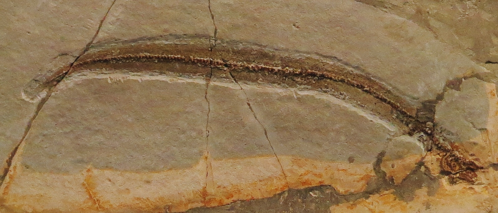 Fossil - Took the picture at Museo di storia naturale di Verona